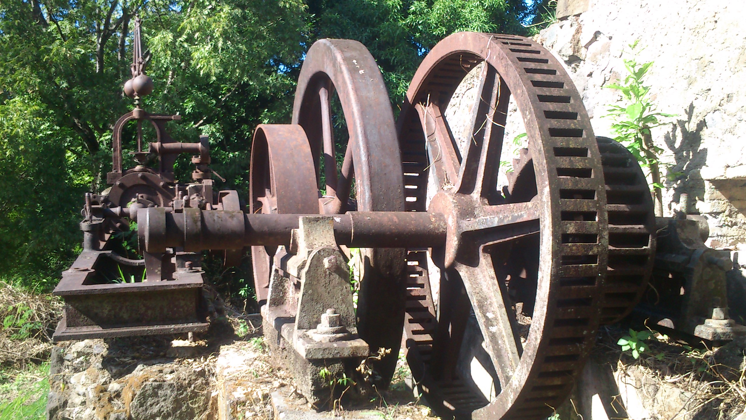 Une des rares machine à vapeur du XVIIIe siècle